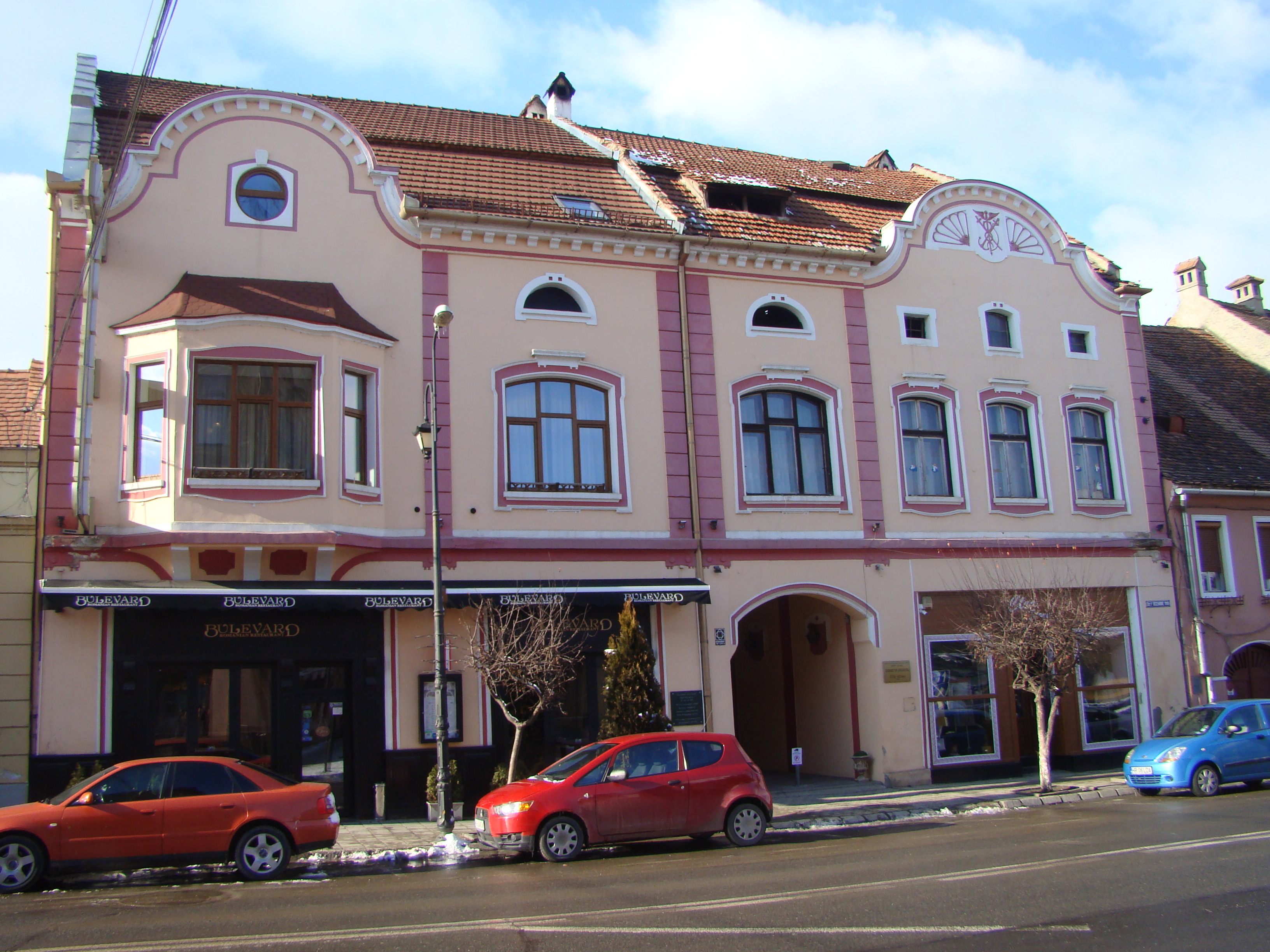 Casă, municipiul Sighişoara, str. 1 Decembrie 1918 7 sec. XIX